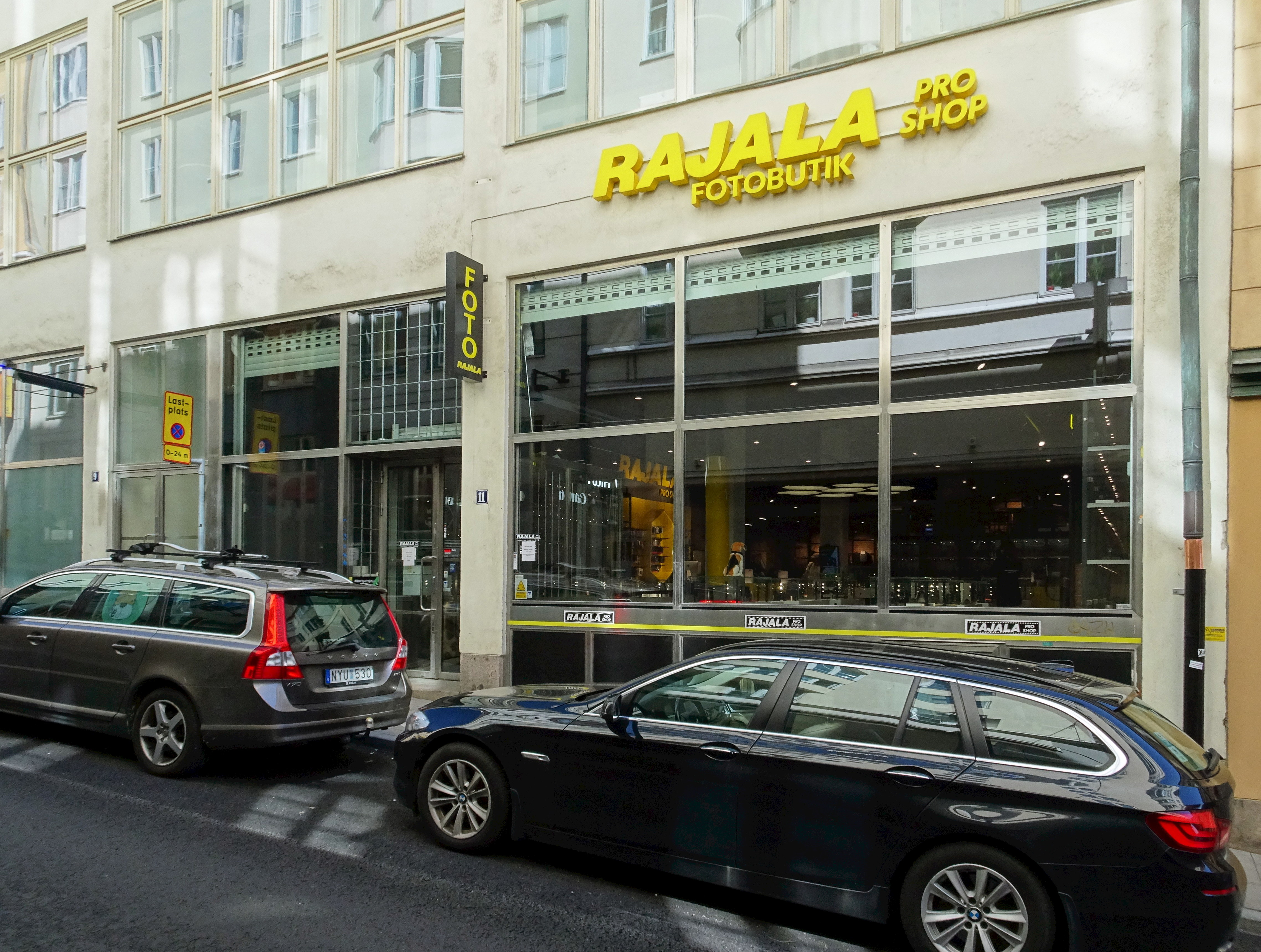 Rajala Foto, Herkulesgatan 11, Stockholm